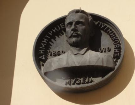 Душан Ј. Басић: Баррељеф Д.Ј.Путниковића на згради Педагошког музеја у Београду